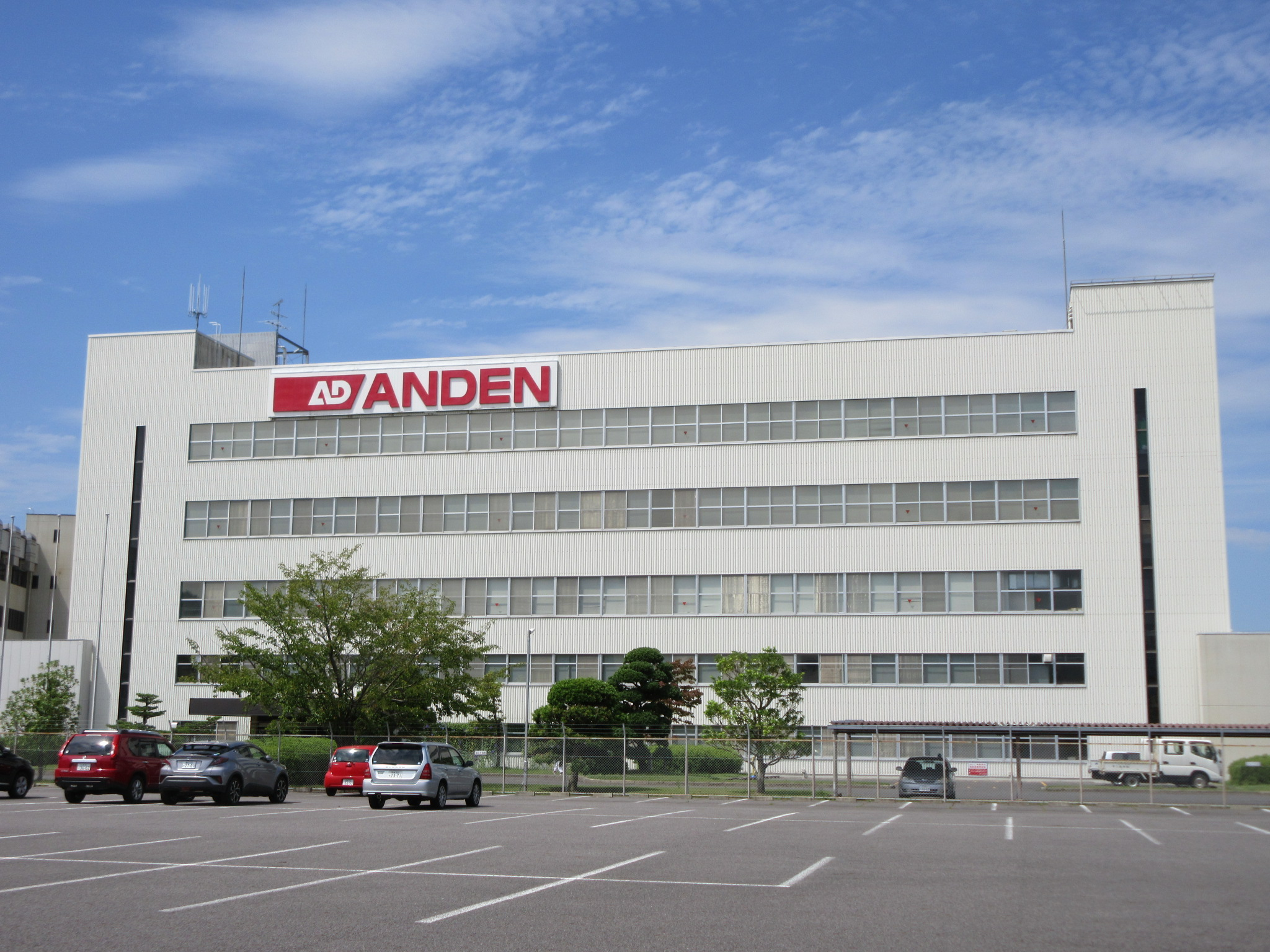 アンデン 岡崎工場（岡崎市真福寺寺）